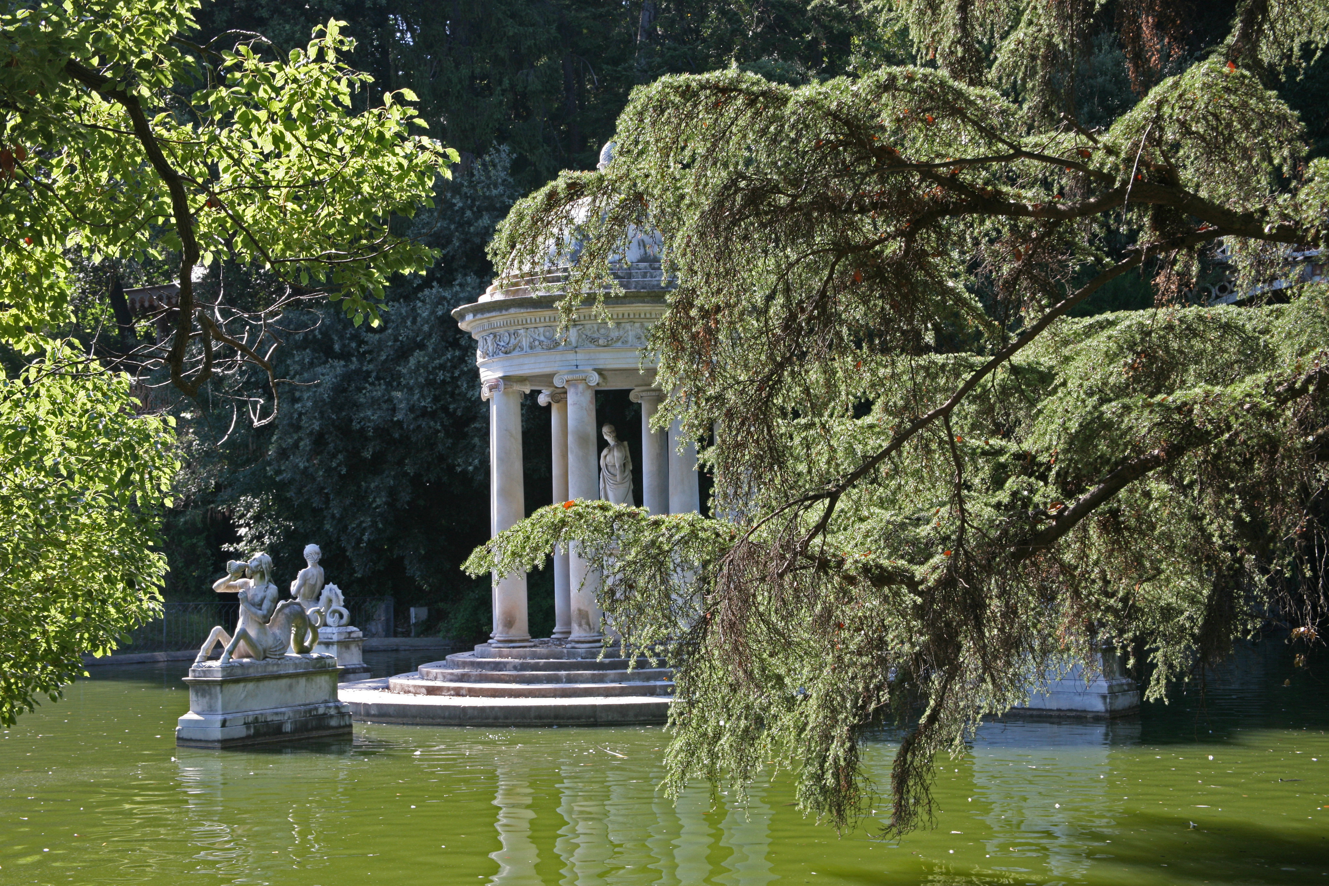 Villa Pallavicini